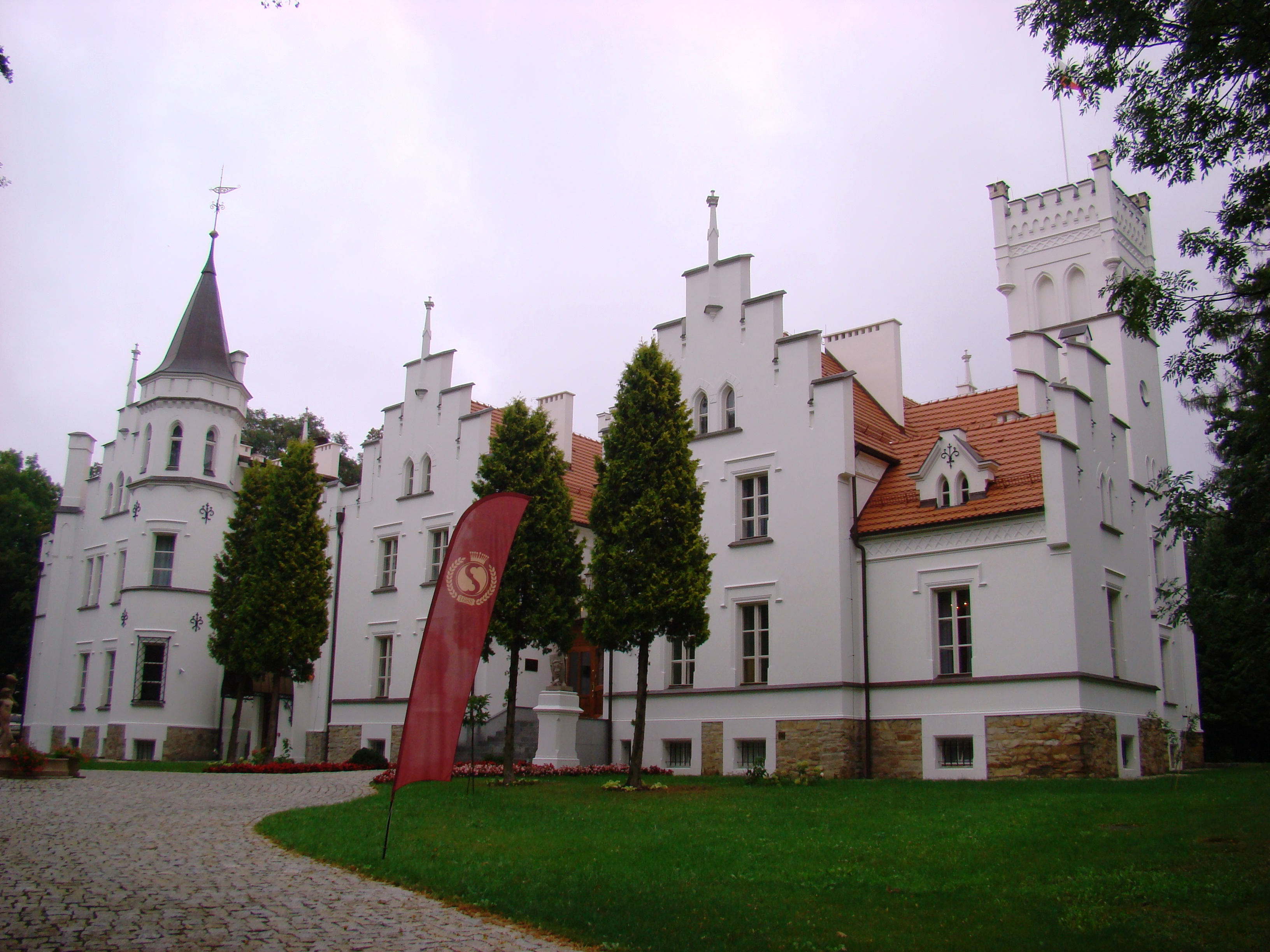 Neogotycki pałac z połowy XIX wieku Sulisław 05.1977.